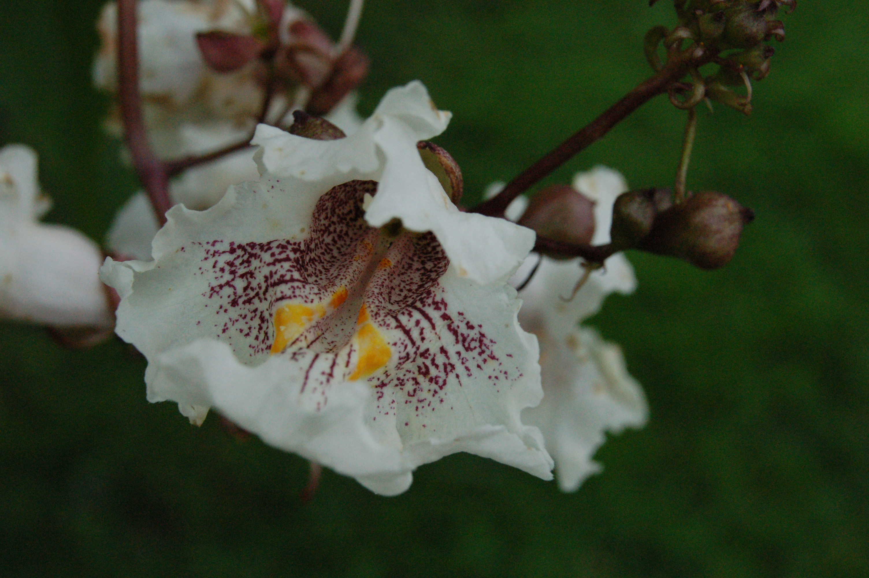 Fleurs de Catalpa bignonioides